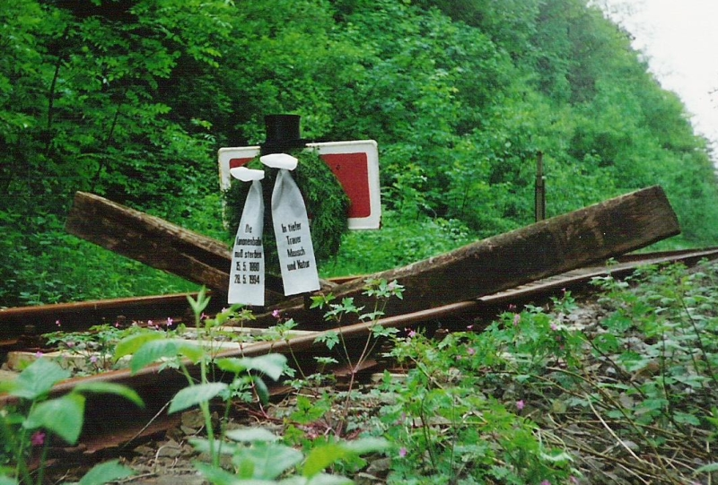 Schwellenkreuz auf der Bahnstrecke Leinefelde–Treysa bei Küllstedt, am 28. Mai 1994 durch Eisenbahnfreunde mit einem Kranz behängt. Tag der Stilllegung Küllstedt–Dingelstädt.